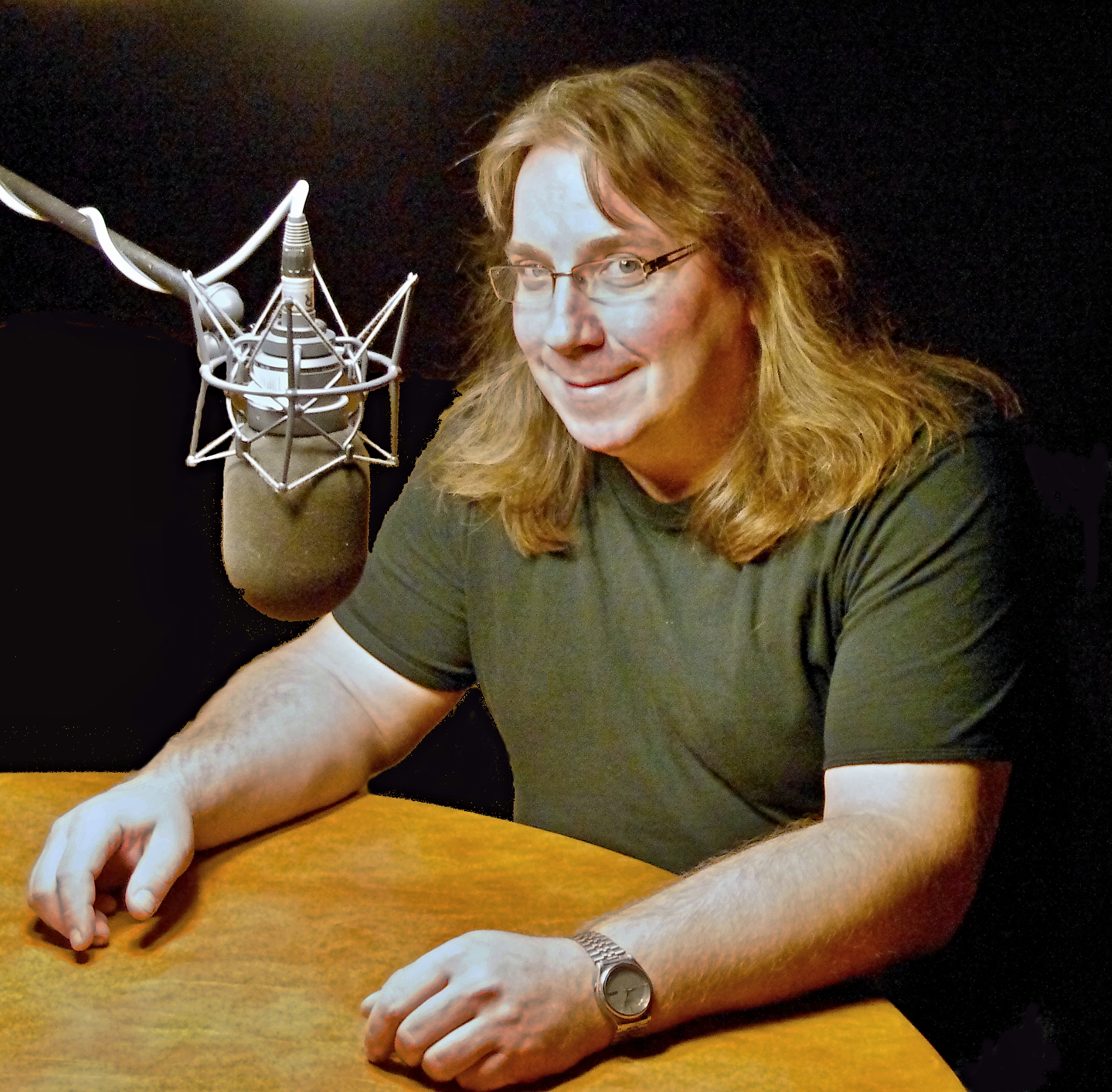 Miroslav Kobza